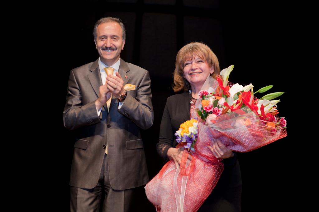 Aziz Yeniay (mayor of Küçükçekmece) and İdil Biret (born 21 November 1941 in Ankara, Turkey), Turkish concert pianist at Küçükçekmece, Turkey in 2012.